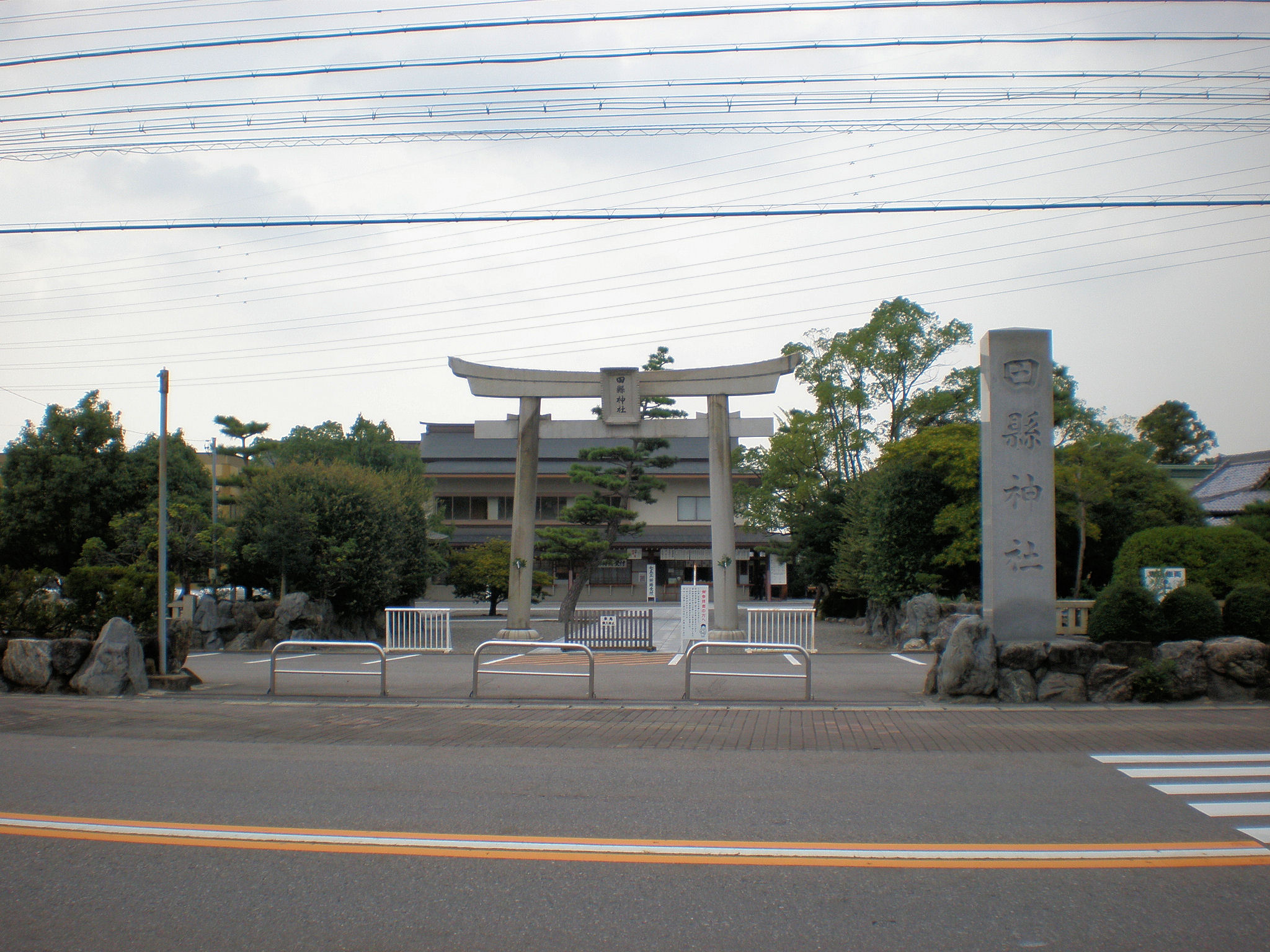 愛知県小牧市にある田縣神社